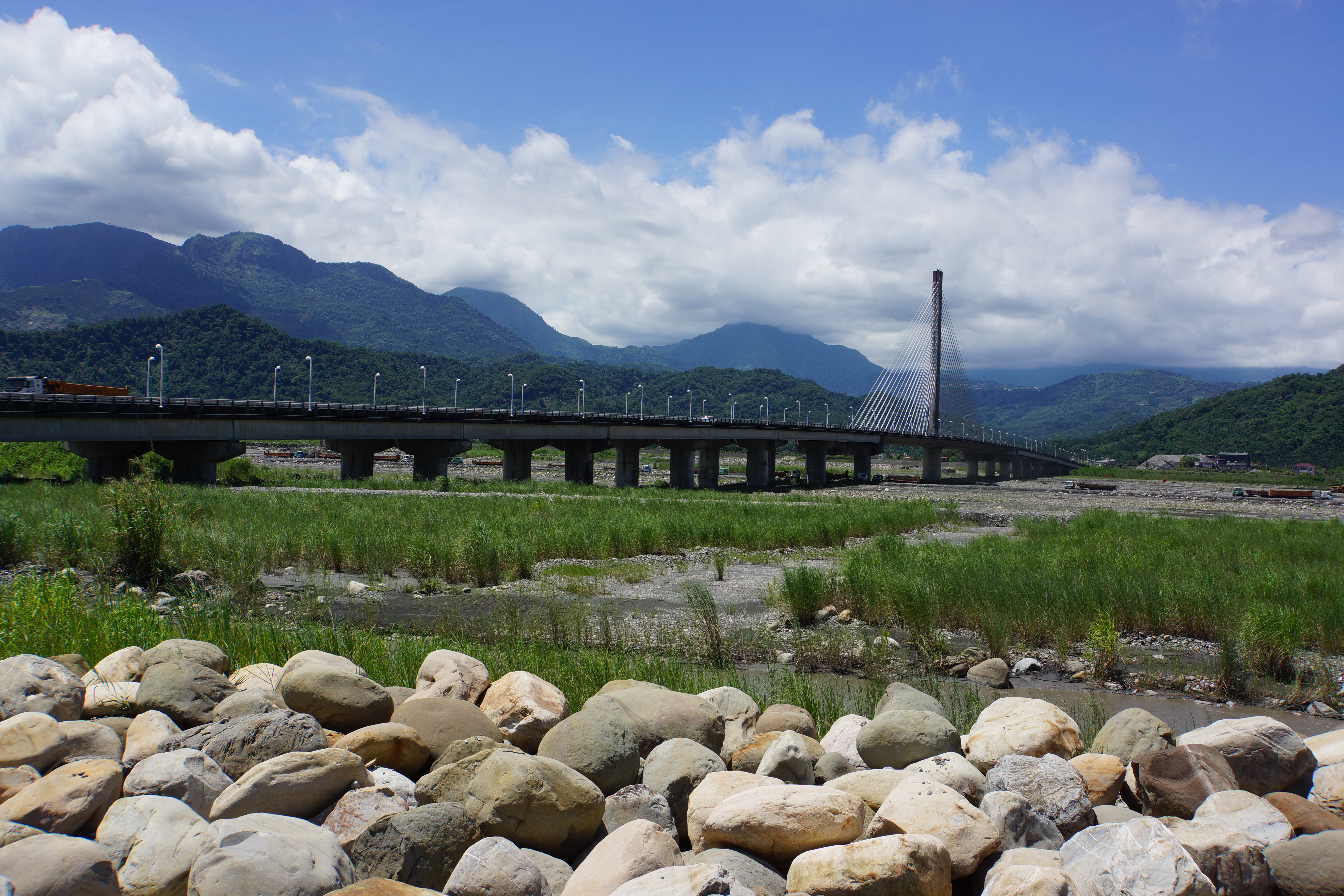 集鹿大橋 Ji-Lu Bridge